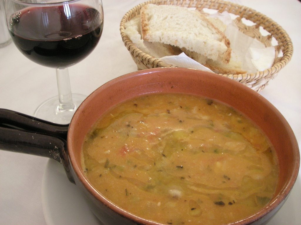 acquacotta bean and minestrone soup